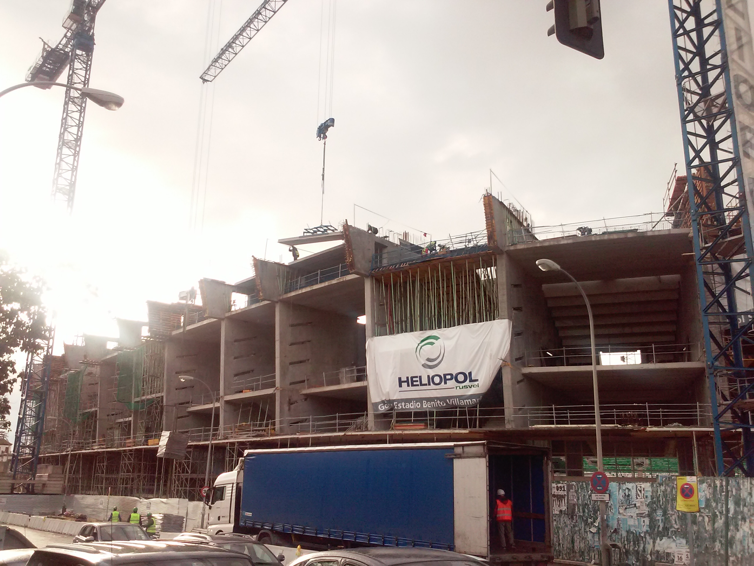 Obras de ampliación del graderío en la zona sur del estadio Benito Villamarin. Marzo de 2017